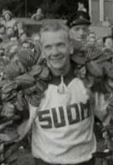 Veikko Karvonen in een lauwerkrans na de overwinning van internationale marathon van Enschede